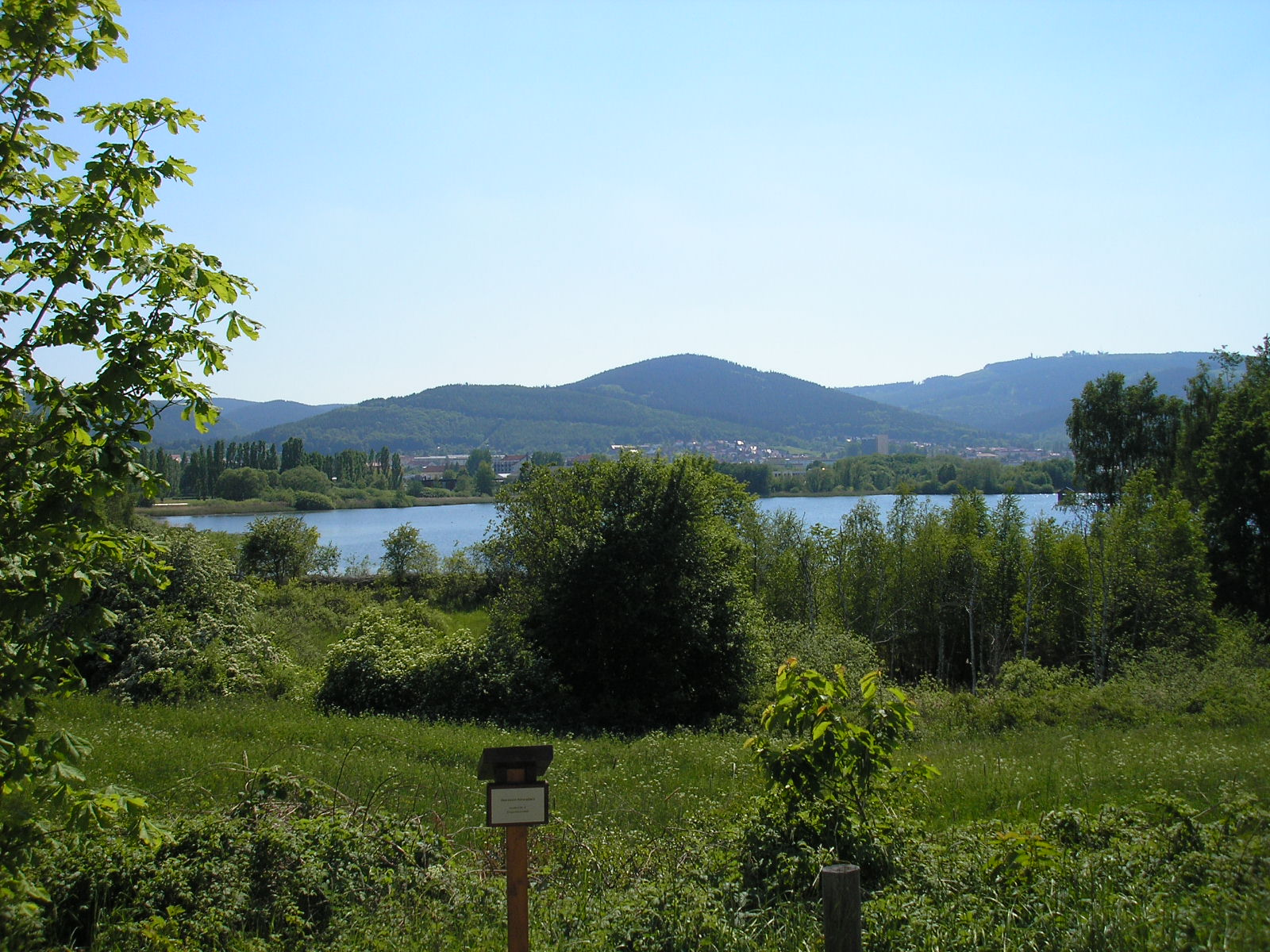 Der Große Teich in Ilmenau, im Hintergrund Lindenberg (mitte) und Kickelhahn (rechts) sowie einige Teile der Stadt.